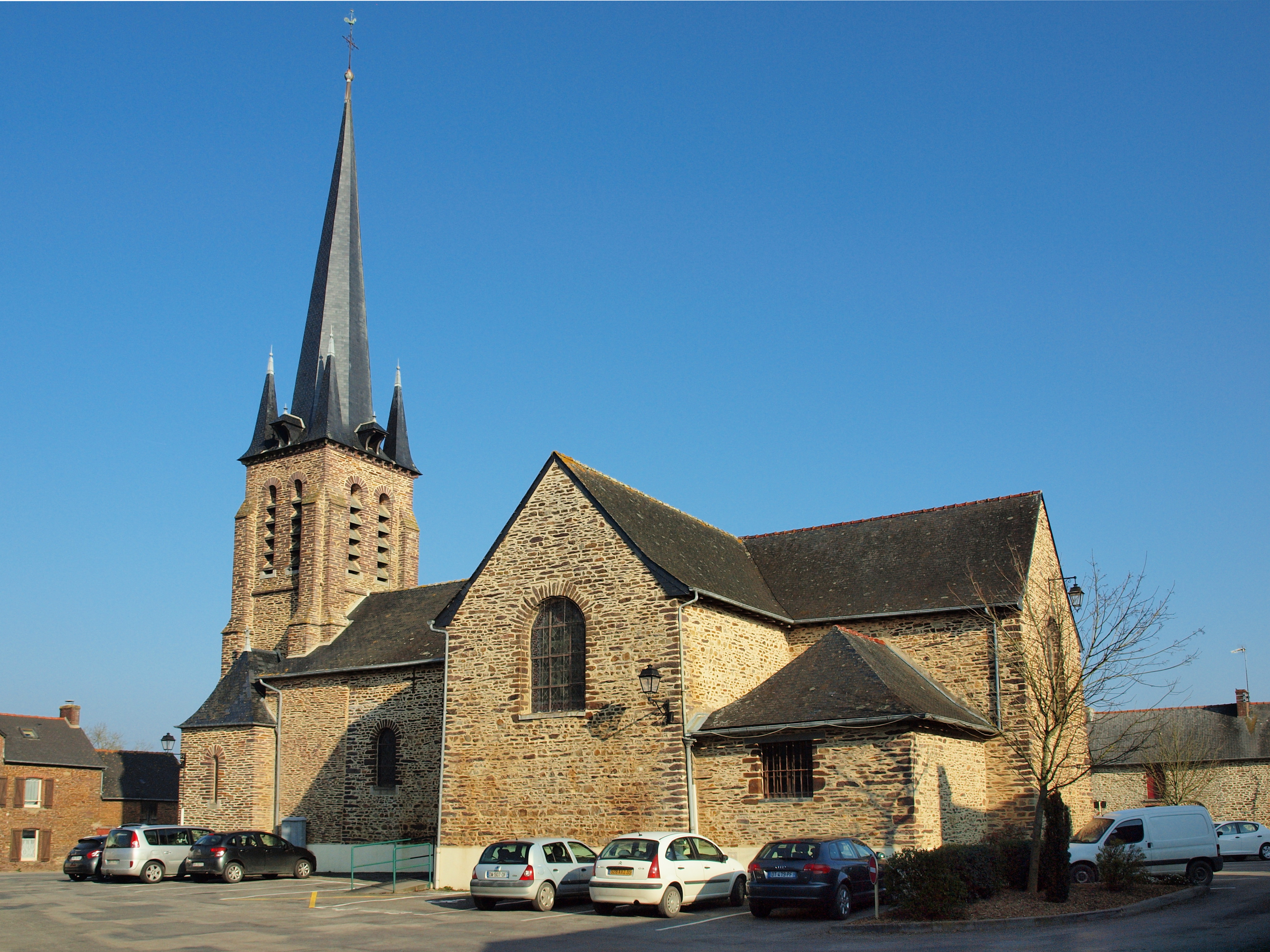 Église Sacré-Coeur-de-Jésus du Petit-Fougeray (Ille-et-Vilaine, France)